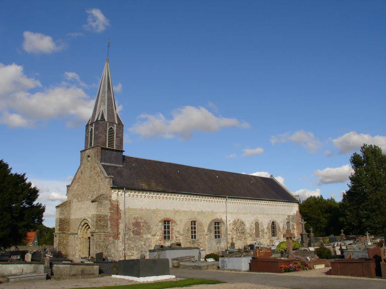 Église de Groffliers